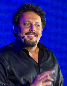 Enrico Brignano_Evolushow